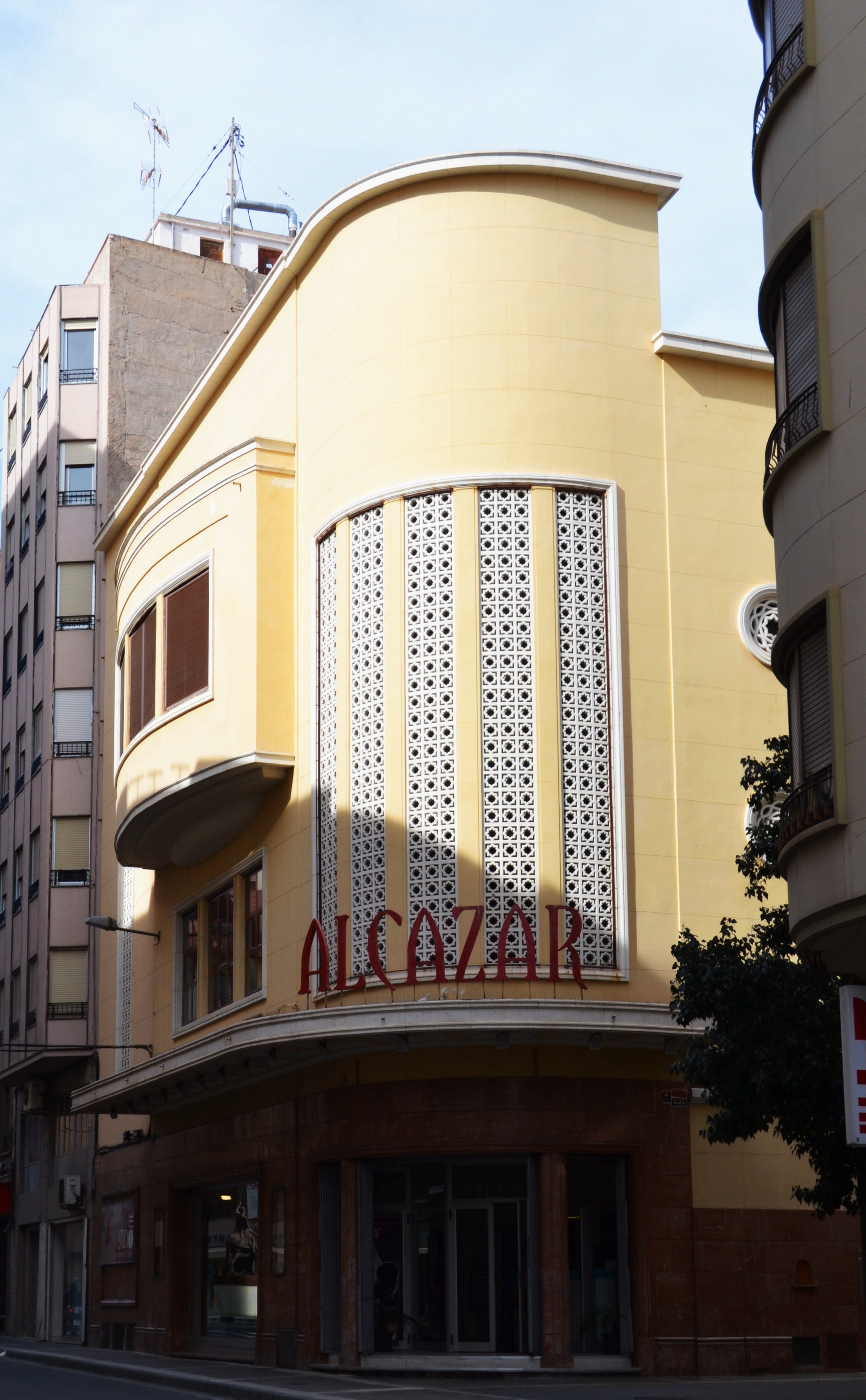 Elx, antic cinema Alcázar.